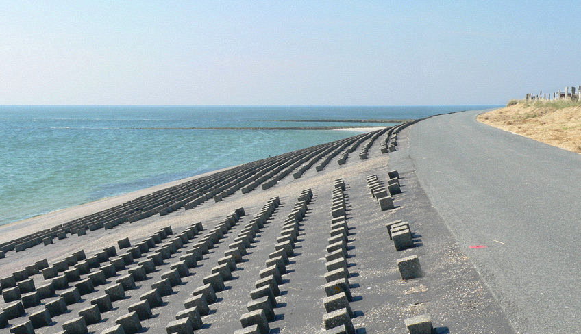 Wangerooge, Westküste